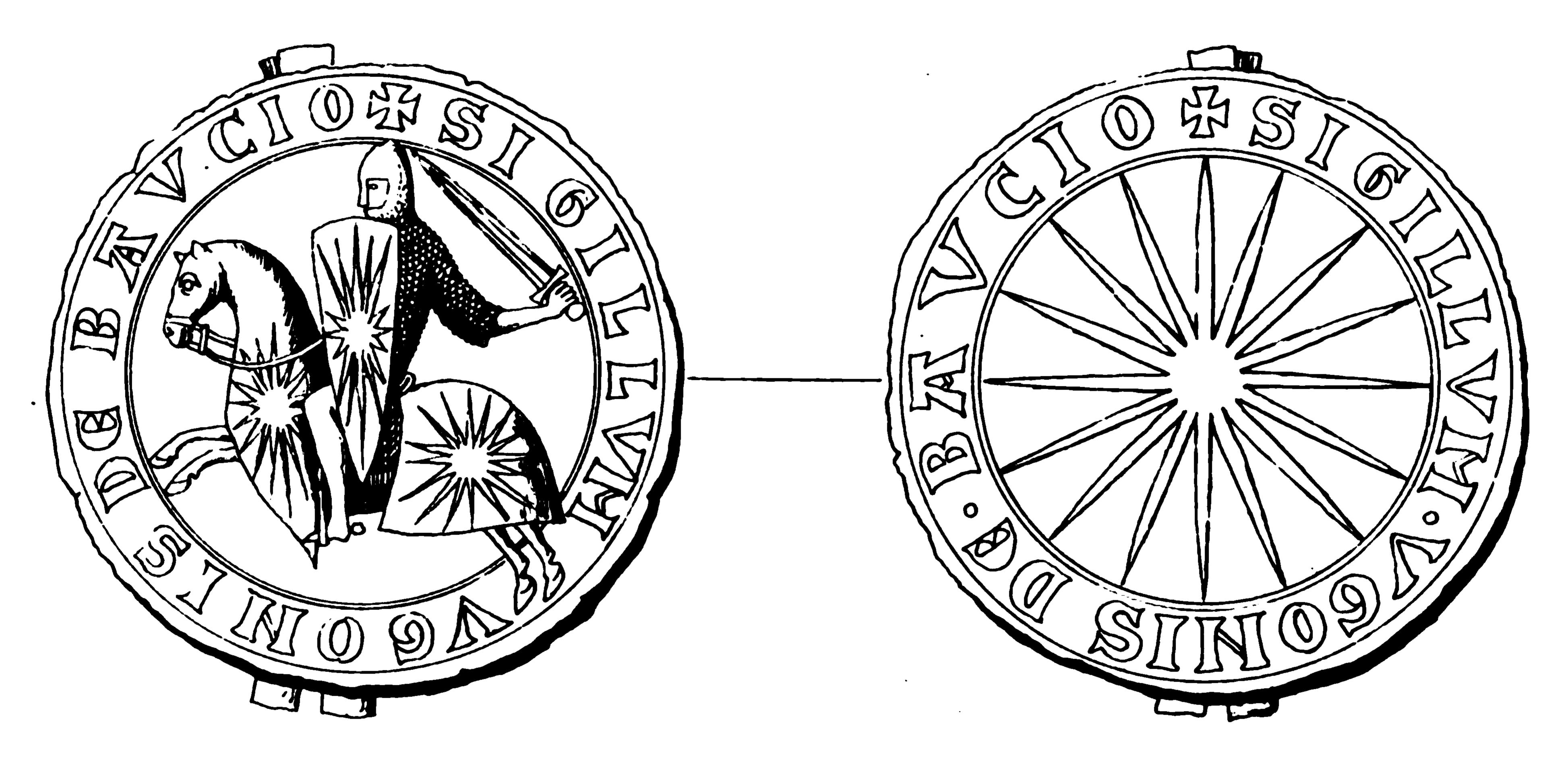 Sceau d'Hugues III des Baux. XIII siecle